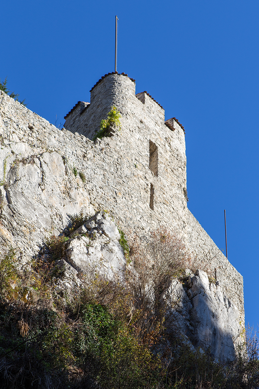 Schloss von in Soyhières (JU) (Nur von Mitte Mai bis Mitte November jeweils sonntags geöffnet.)